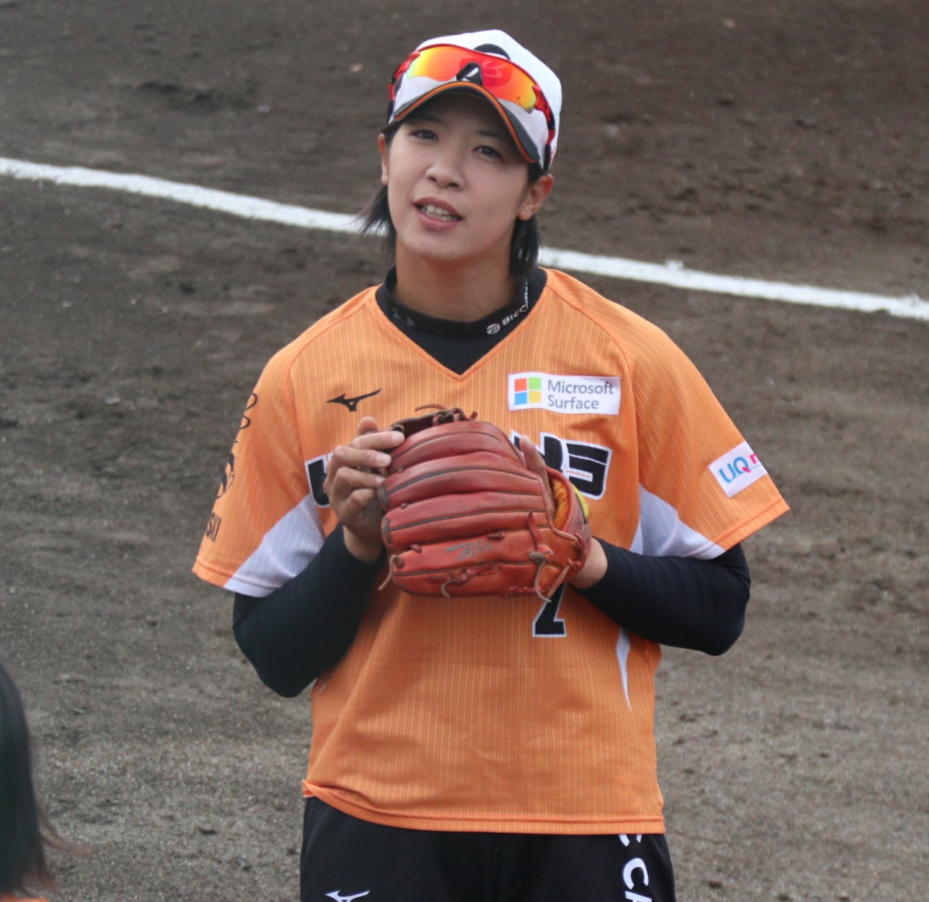 工藤環奈選手